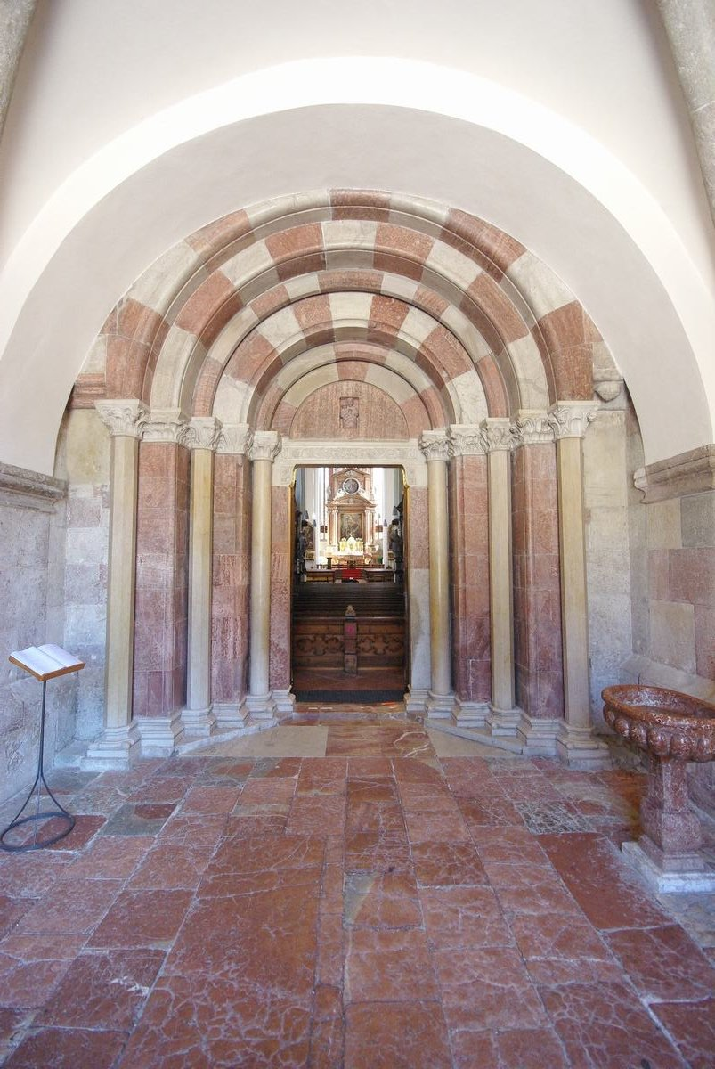 Schloßplatz 4, 83471 Berchtesgaden; Kath. Pfarrkirche, westl. HauptportalThis is a photograph of an architectural monument.